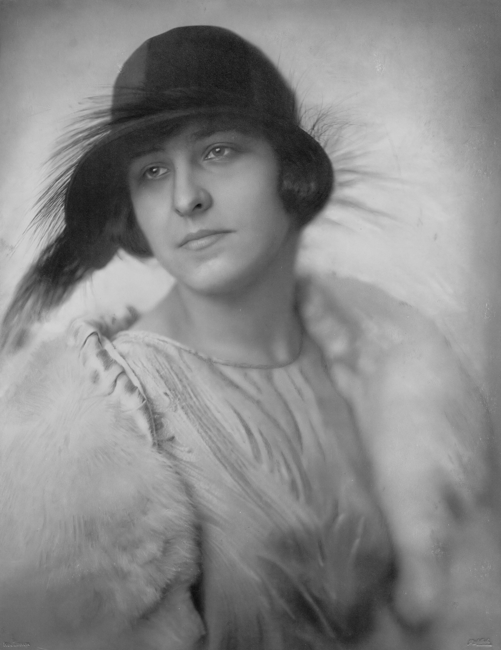 Mej. M.M. (Mies Merkelbach in mode van Hirsch) 1924